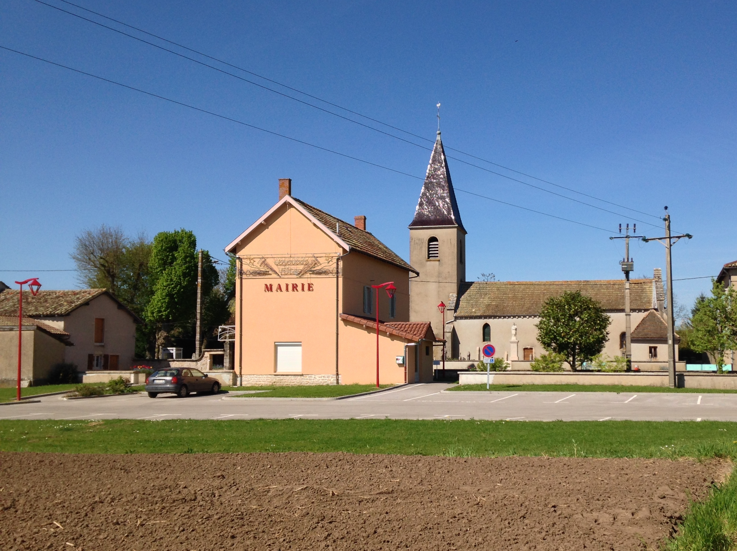 Vue sur la mairie et l'église du village d'Asnières-sur-Saône